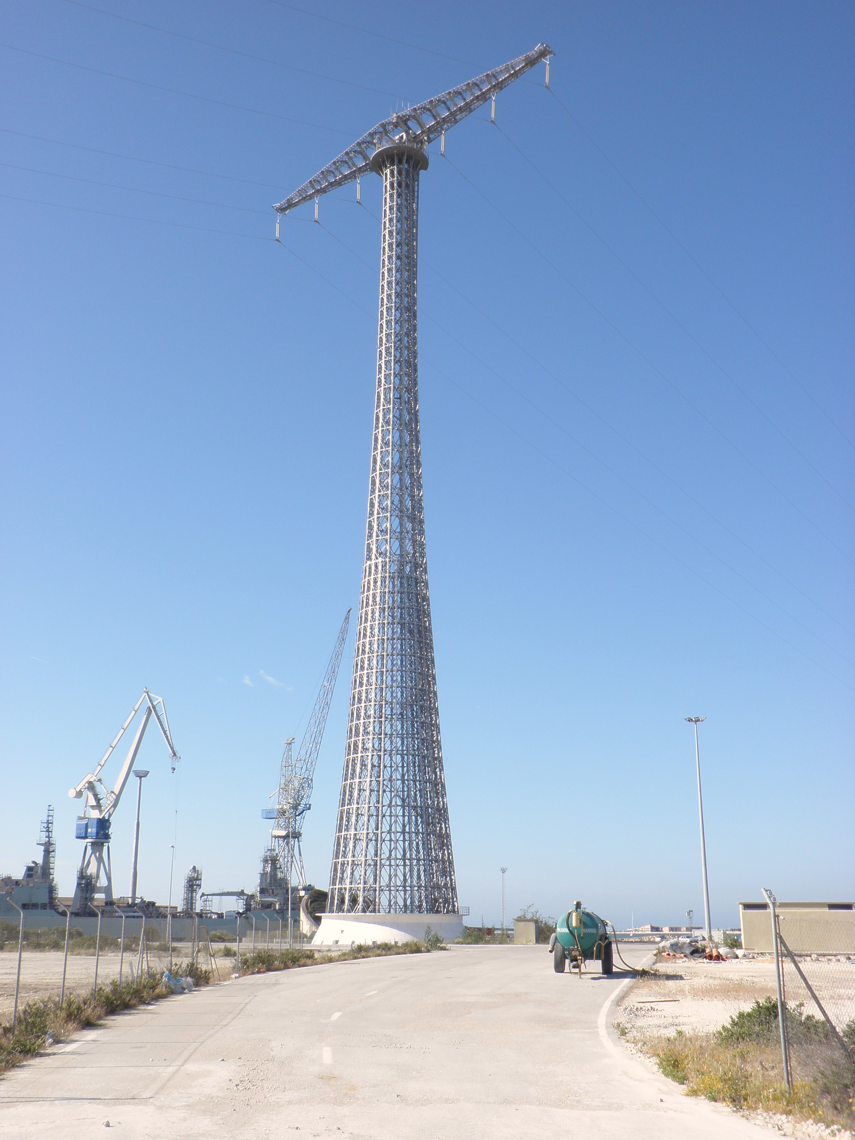 Pilón de Puerto Real (Pilones de Cádiz)